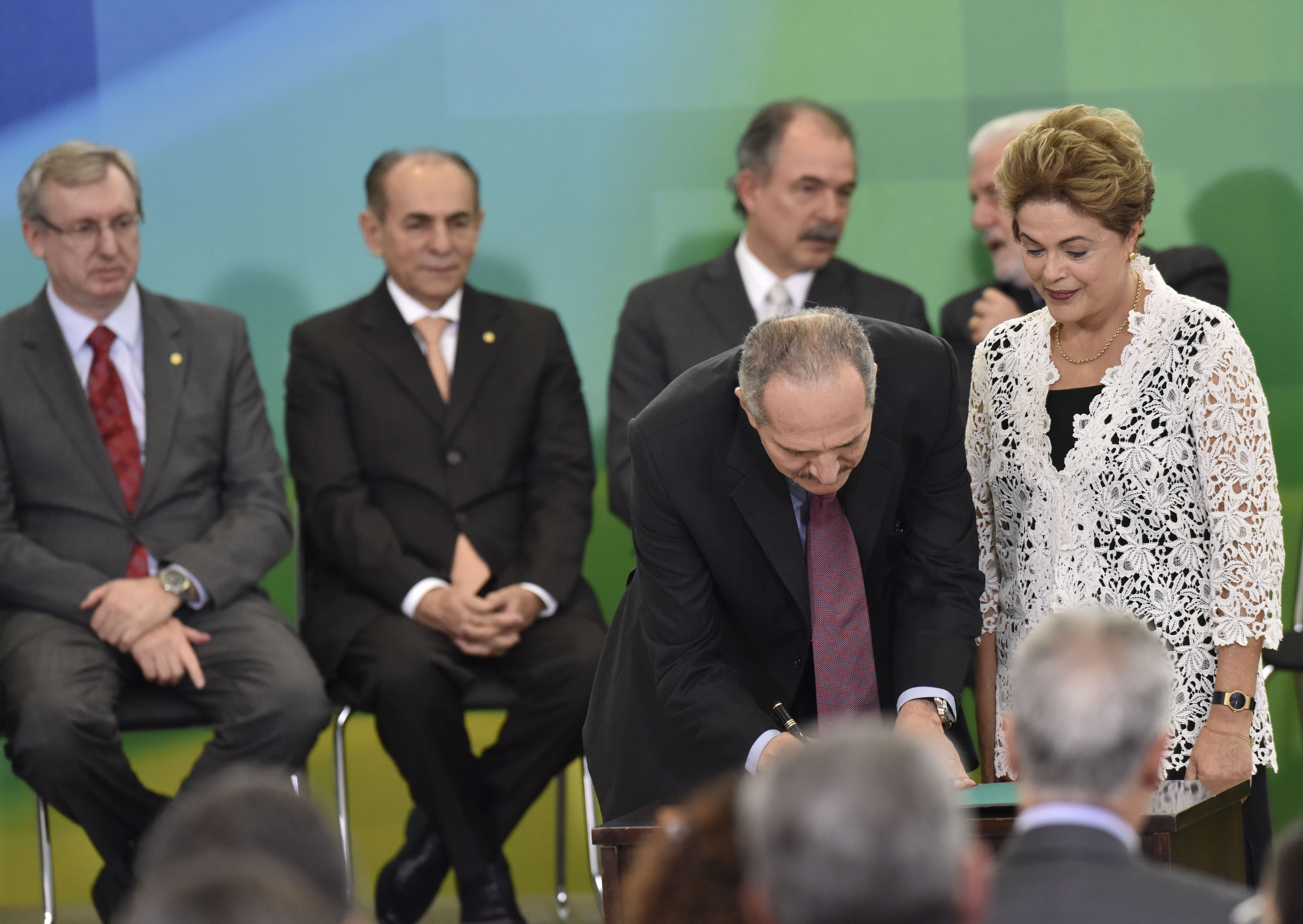 05/10/2015, Brasília - DF Fotos: Gilberto Alves